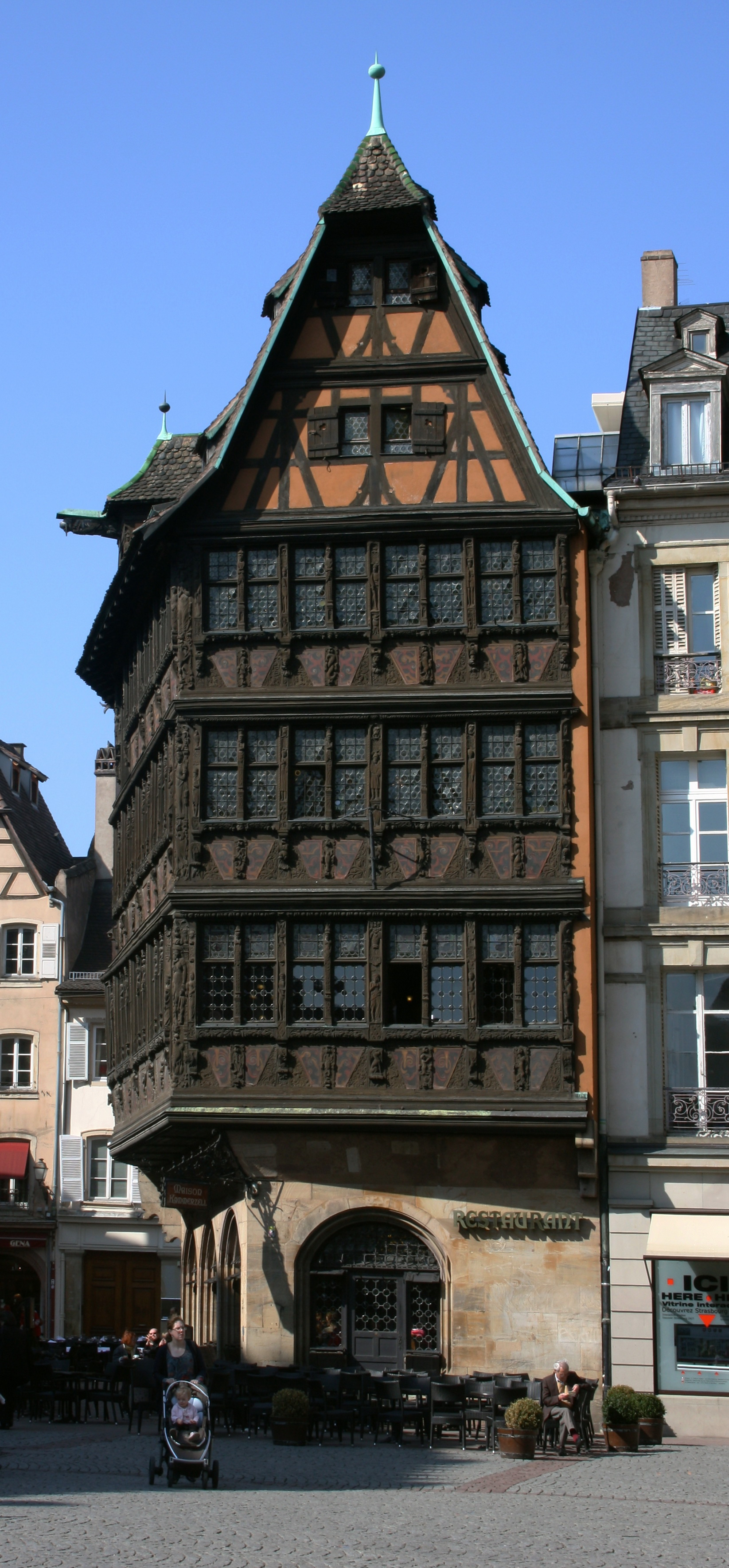 Fachwerkhaus am Platz vor dem Straßburger Münster